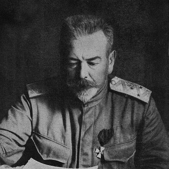 ген. Лукомский